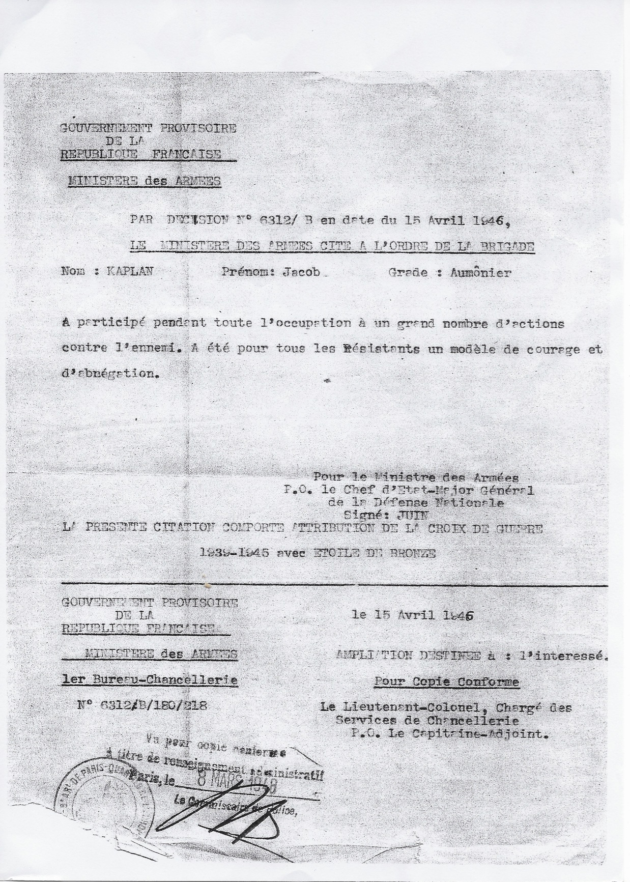 Copie de la citation de Jacob Kaplan au titre de la Brigade de la croix de guerre 1939-1945 pour ses actions contre l'ennemi